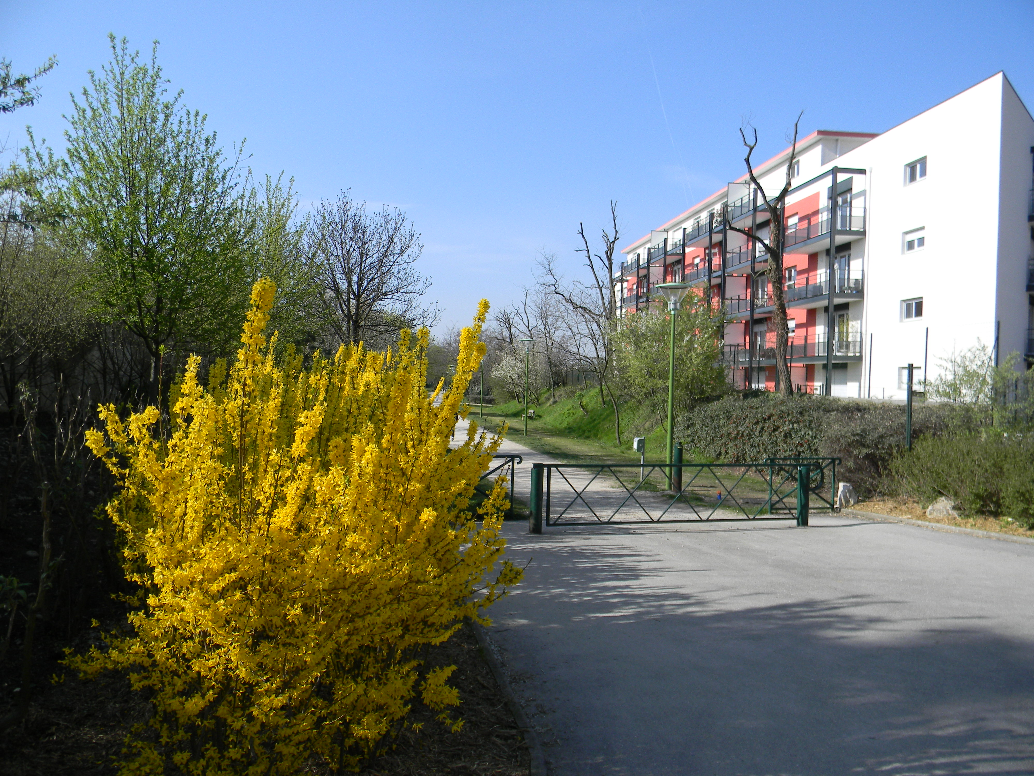 La voie de la Dombes, aussi appelée "Voie verte"